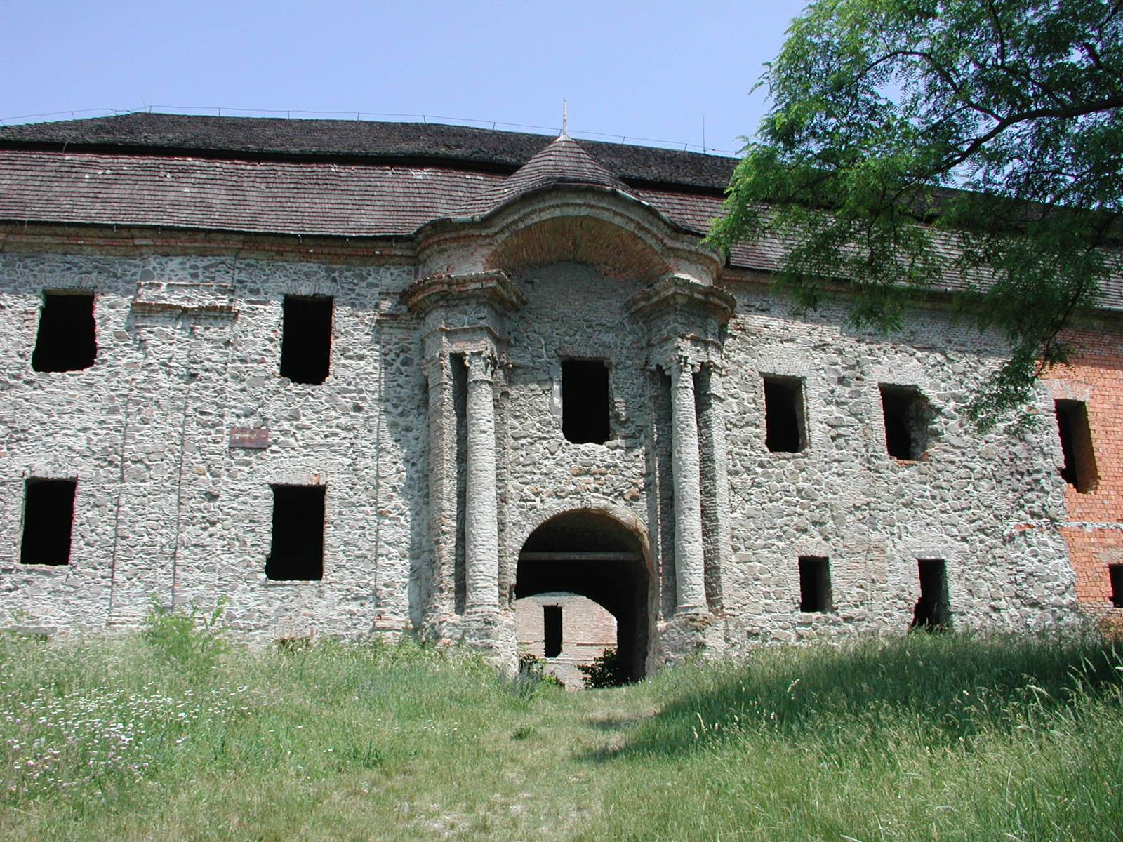 Vchod do ožďanského kaštieľa